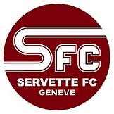 ehemaliges Logo des Servette FC Genève von 1984 - 1991